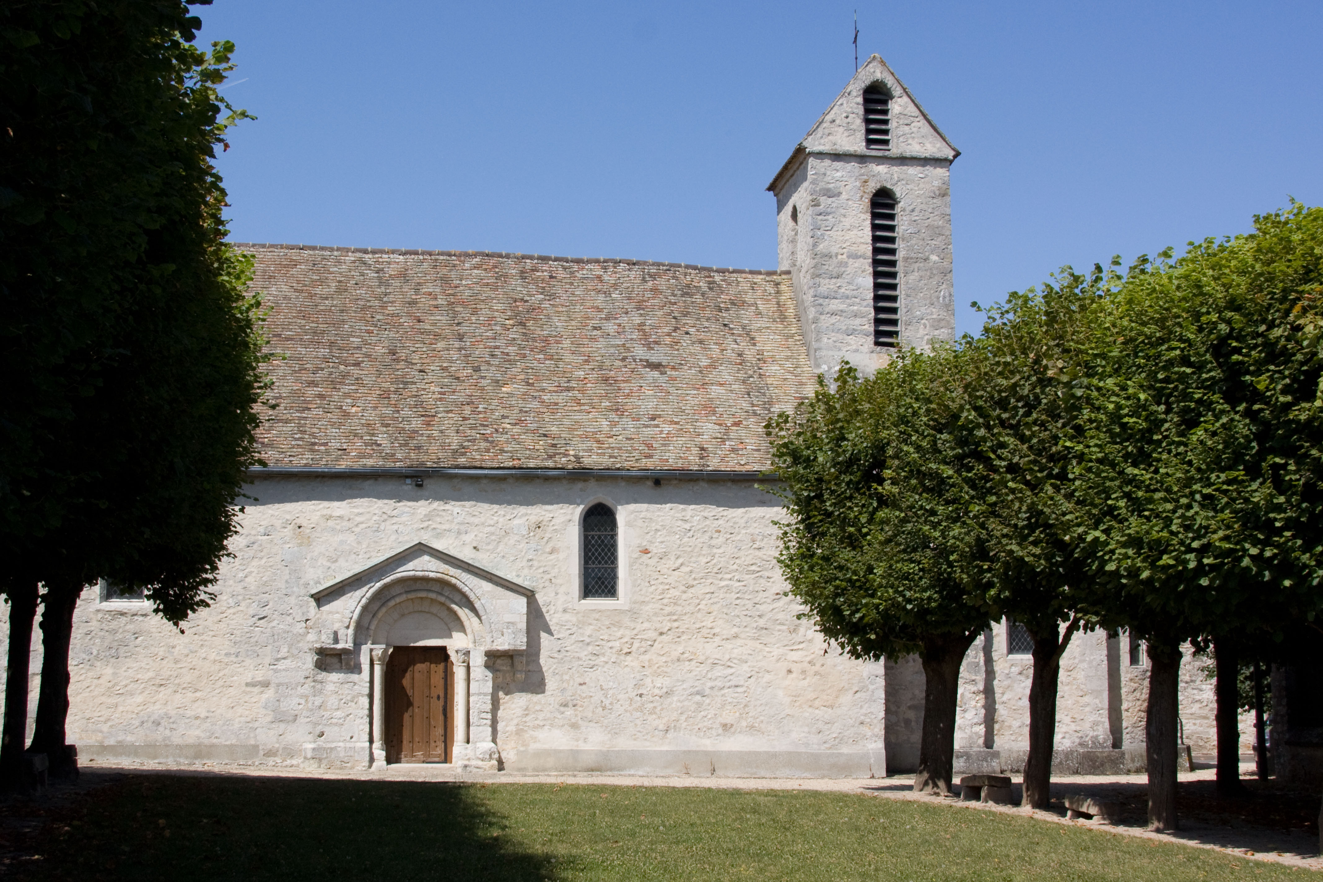 L'église de Oncy-sur-École, Oncy-sur-École, Essonne, France